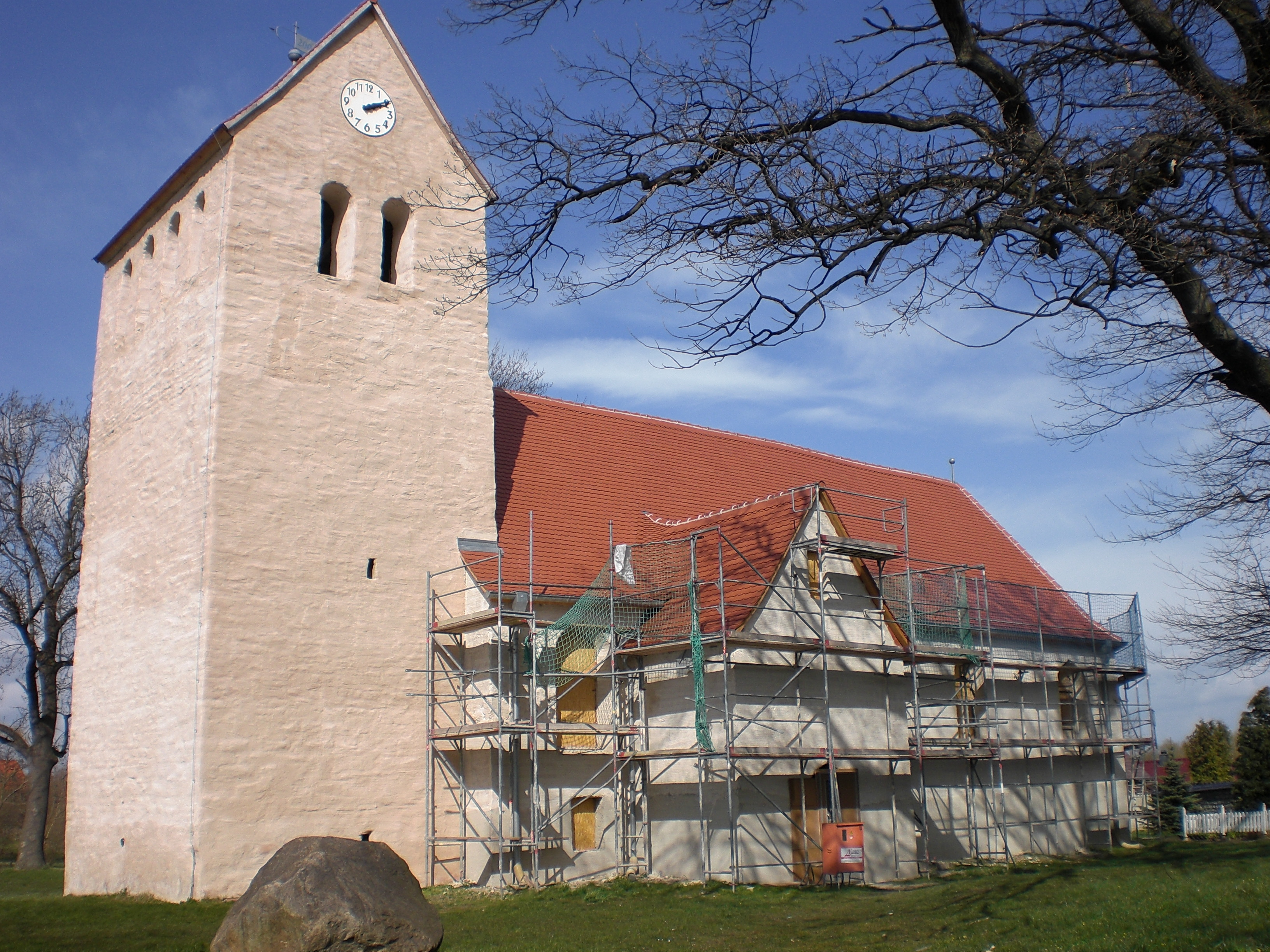 Sankt-Christophorus-Kirche in Dodendorf, Sachsen-Anhalt während der Restaurierungsarbeiten 2008